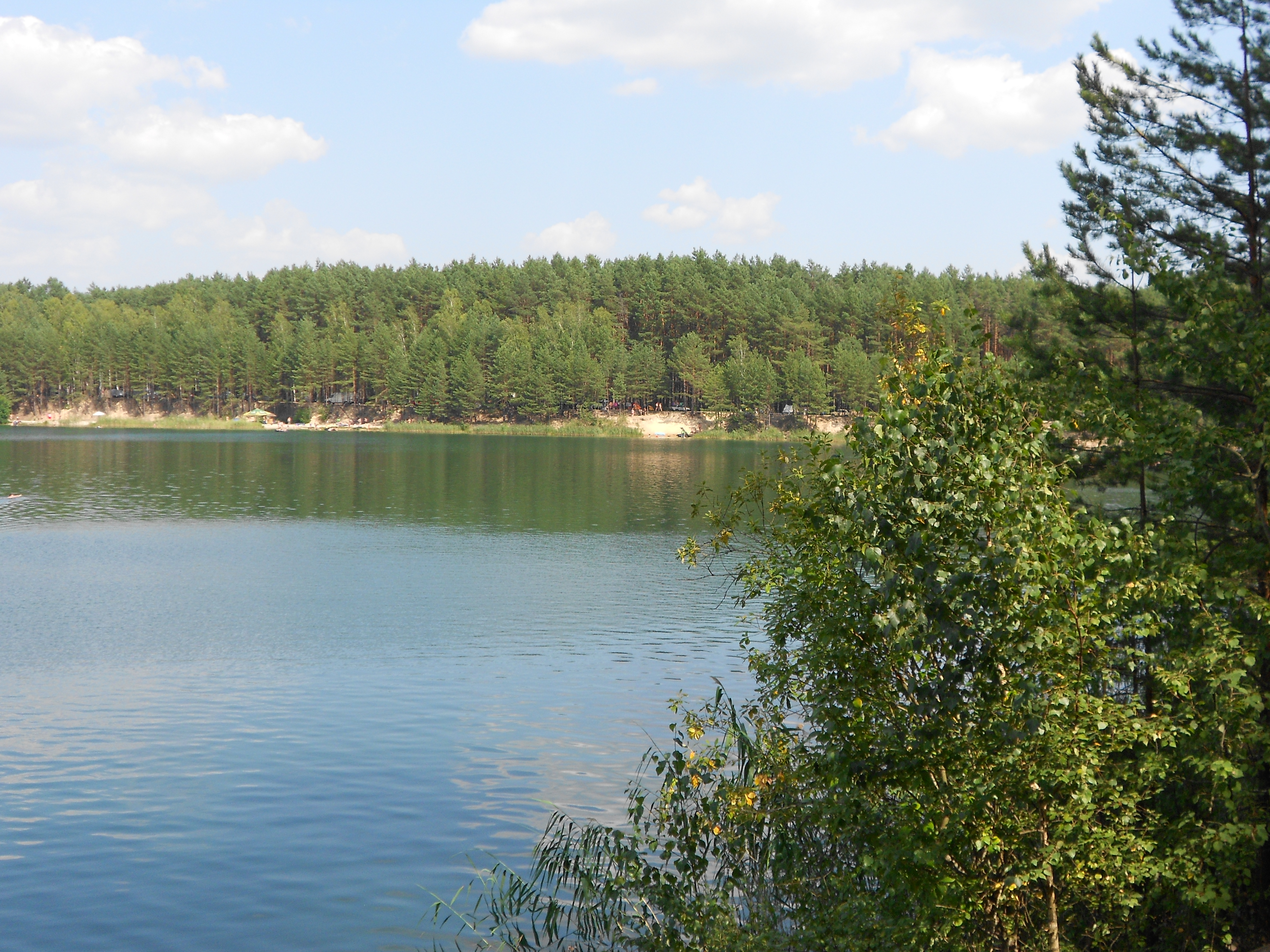 Вікіекспедиція на Голубі озера (Чернігівщина) 2013 рік озеро Велике, Голубі озера, 2013, Чернігівщина, станція Грибова Рудня